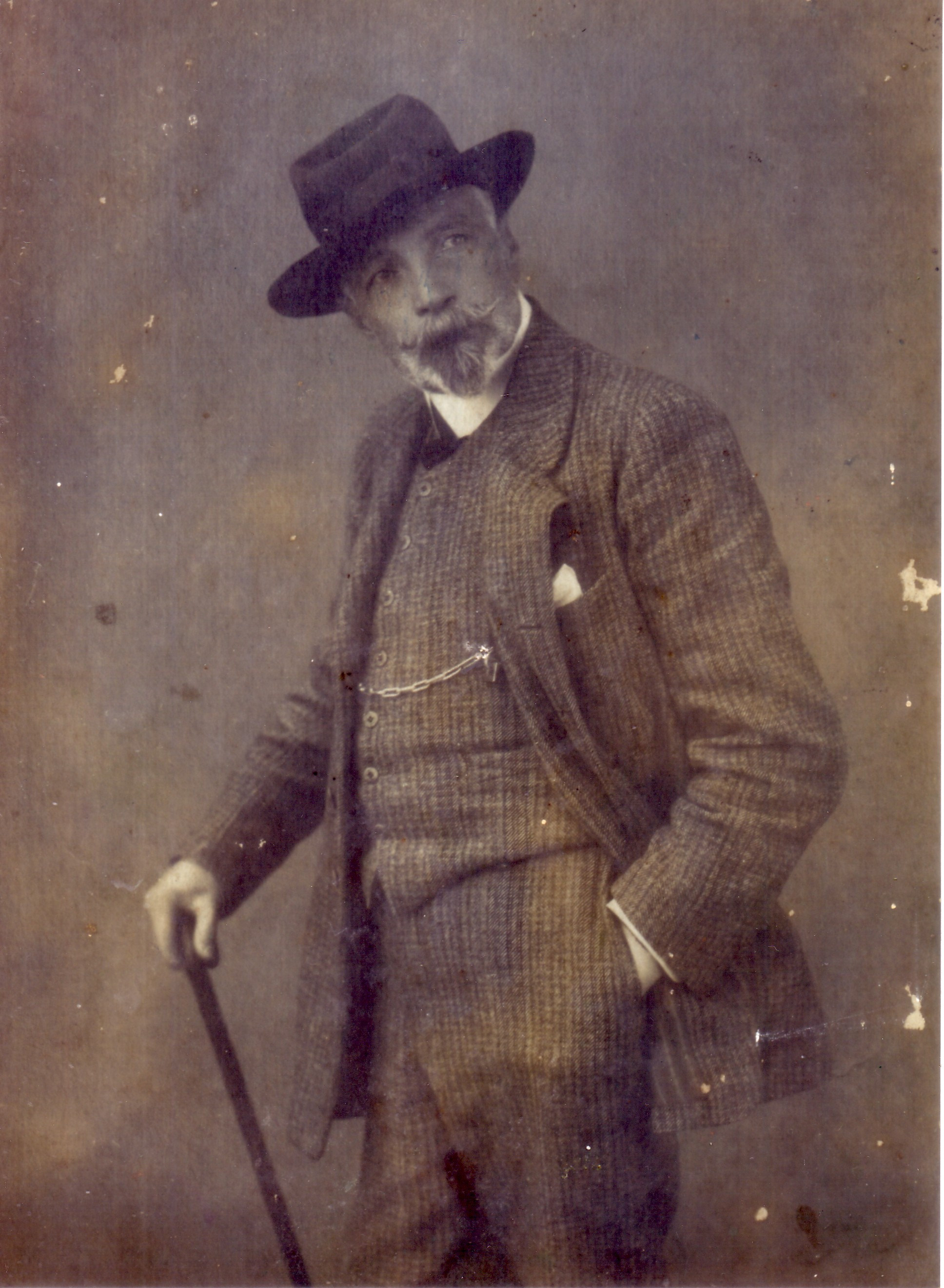 Ritratto di Michele Catti, ca. 1910. Collezione privata